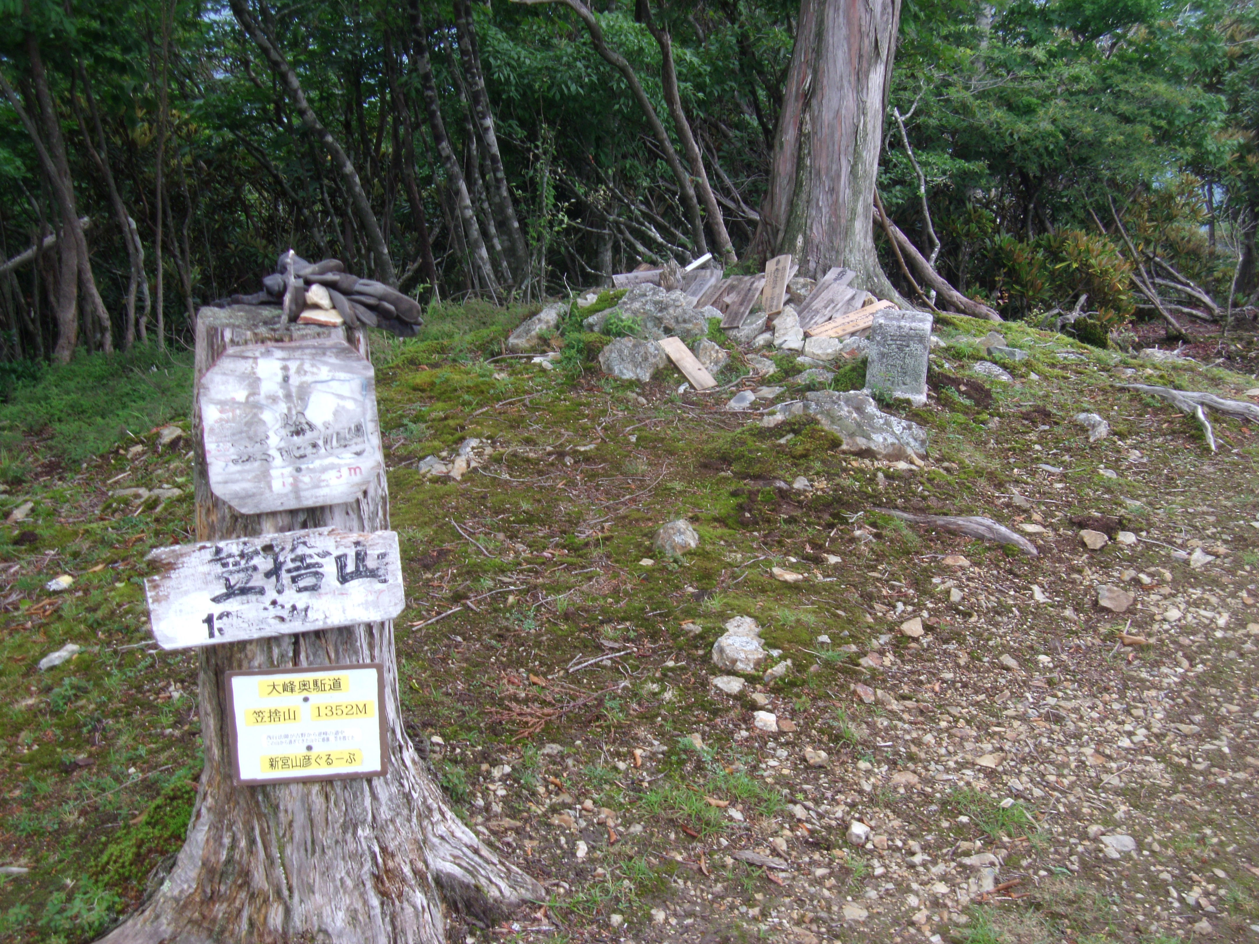 大峯奥駈道第18靡「笠捨山」